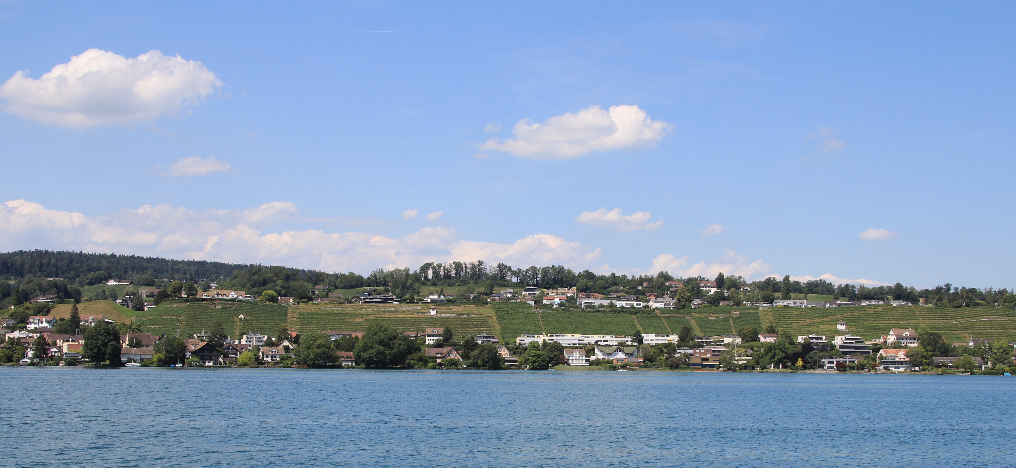 Rebgelände Sternenhalden in de: Uerikon